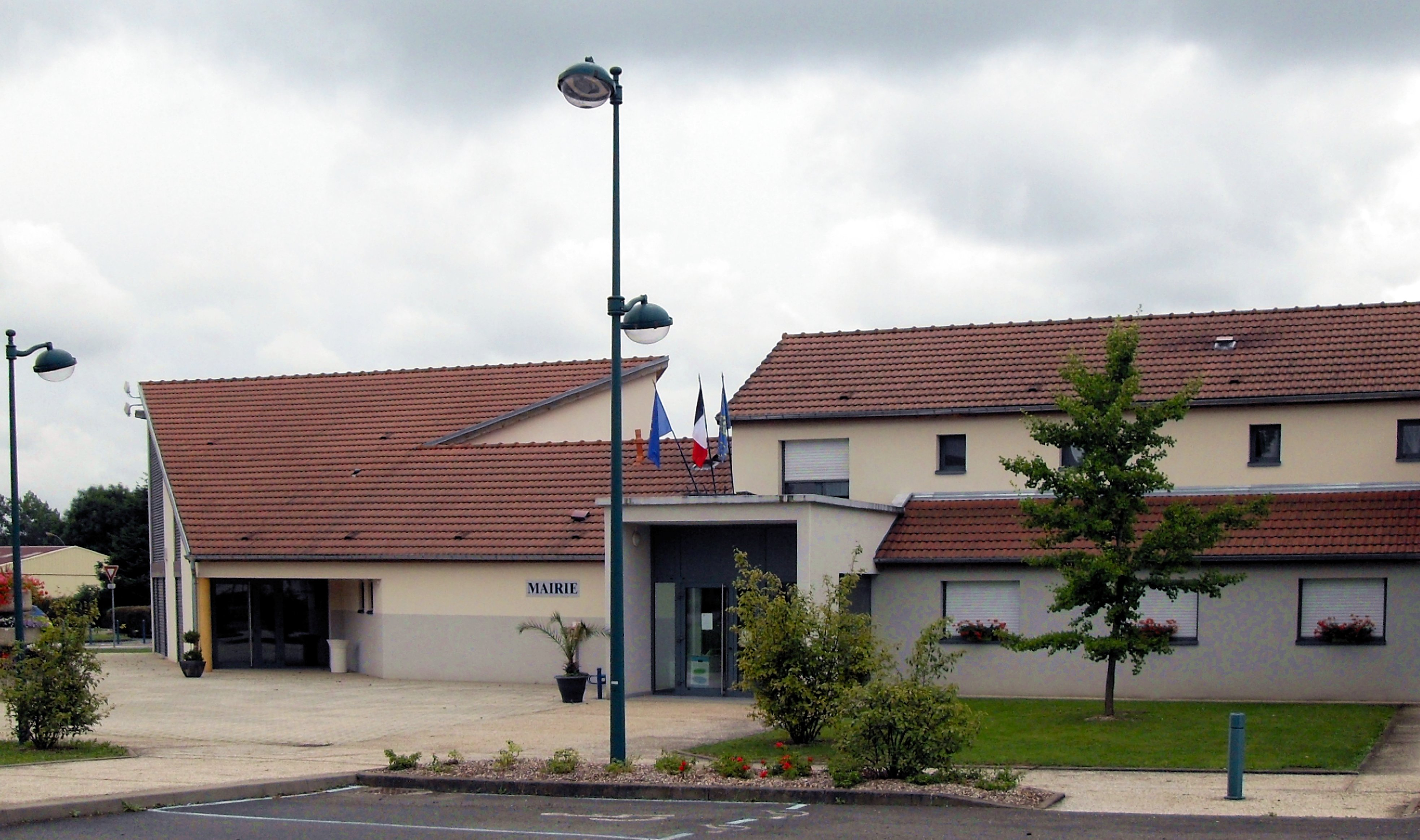 La mairie de Châtenois-les-Forges